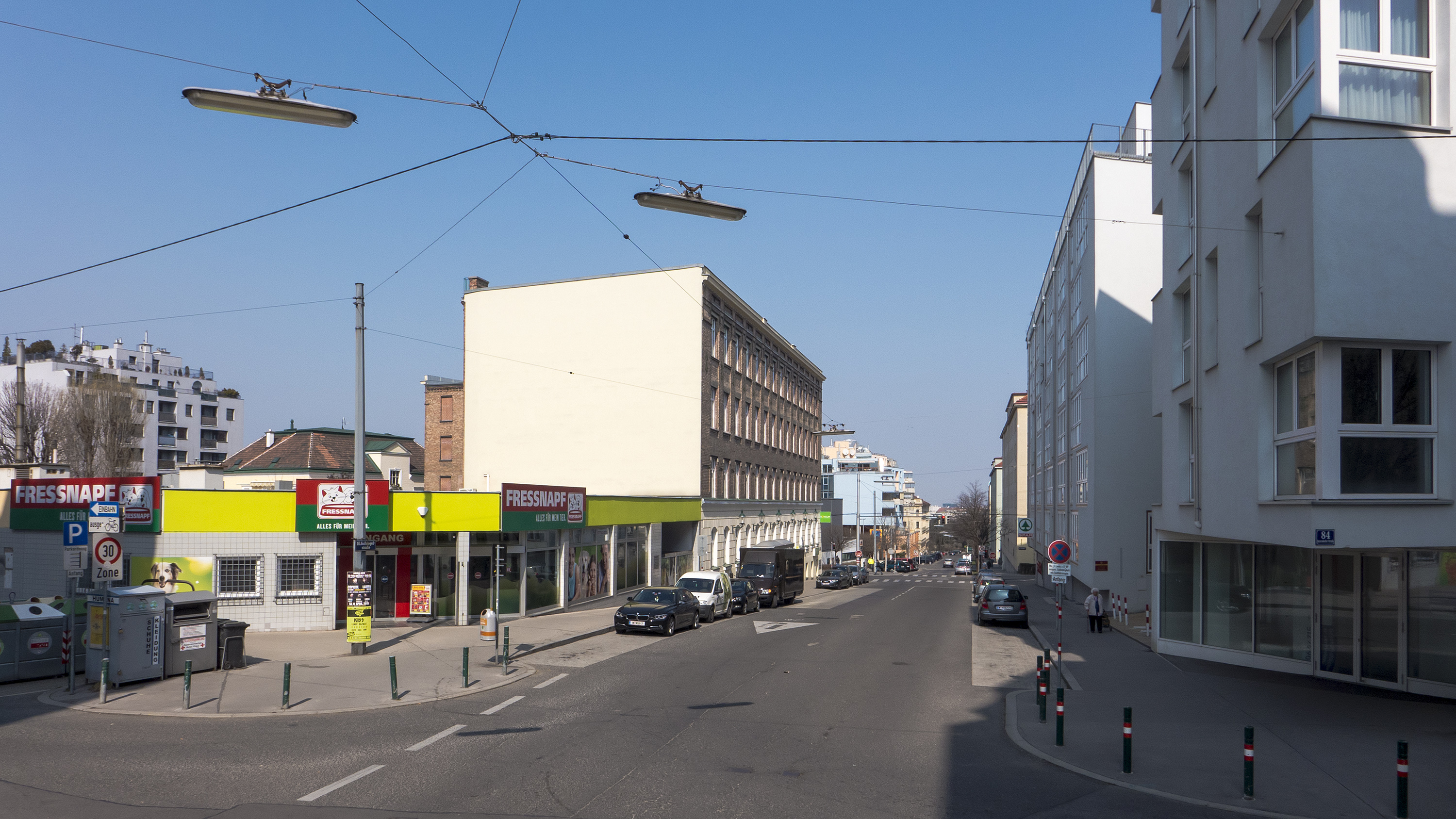 Gussriegelstraße in Wien 10 bei der Inzersdorfer Straße Richtung Nordosten